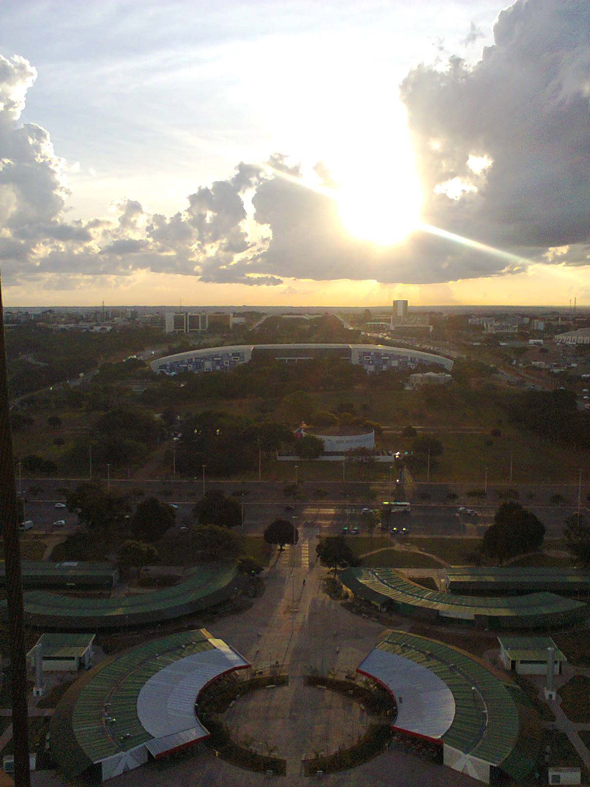 Vista panorâmica do Centro de Convenções de Brasília e da Feira da Torre de TV a partir do mirante da Torre de TV